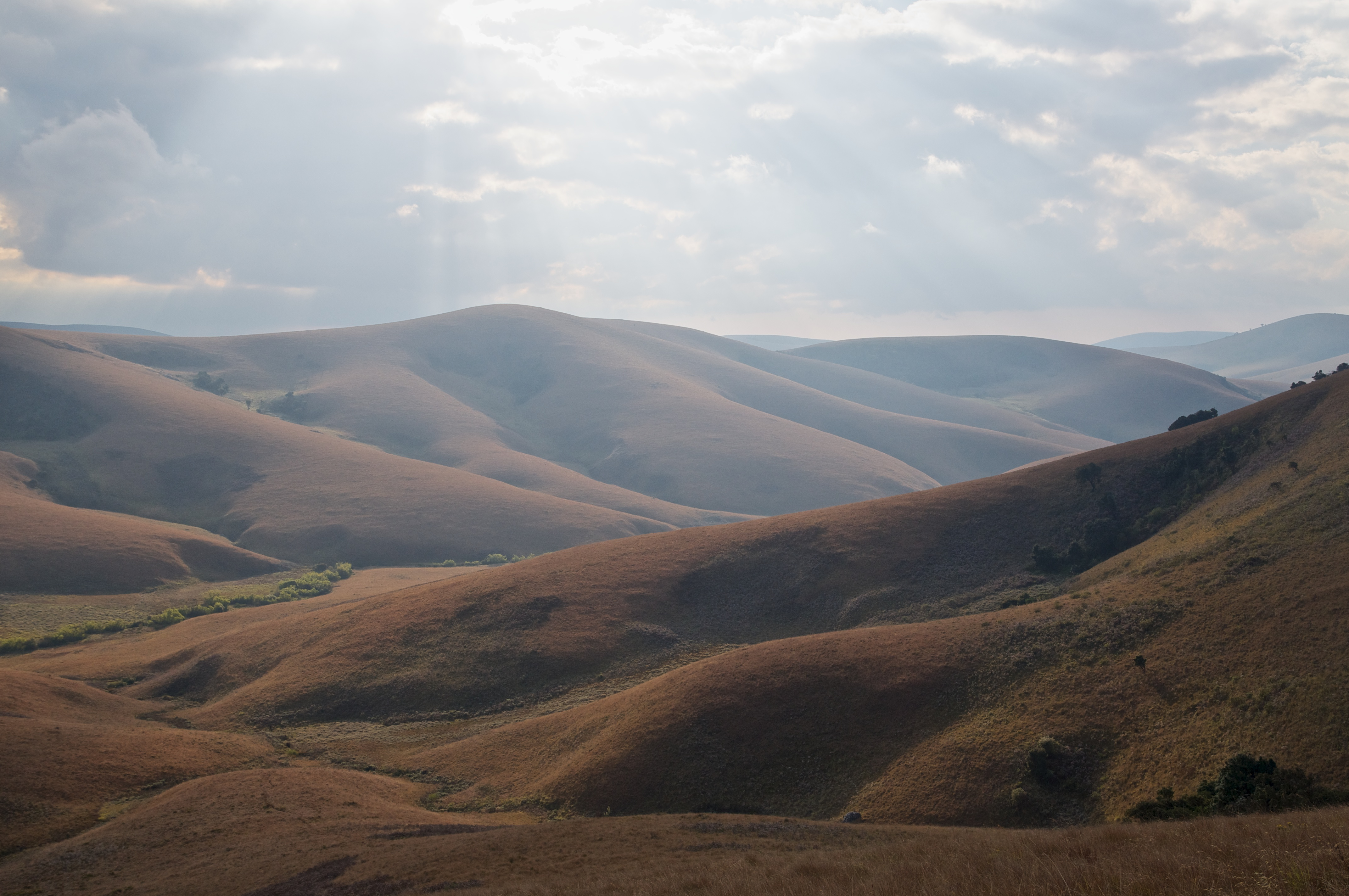 Nyika Plateau II